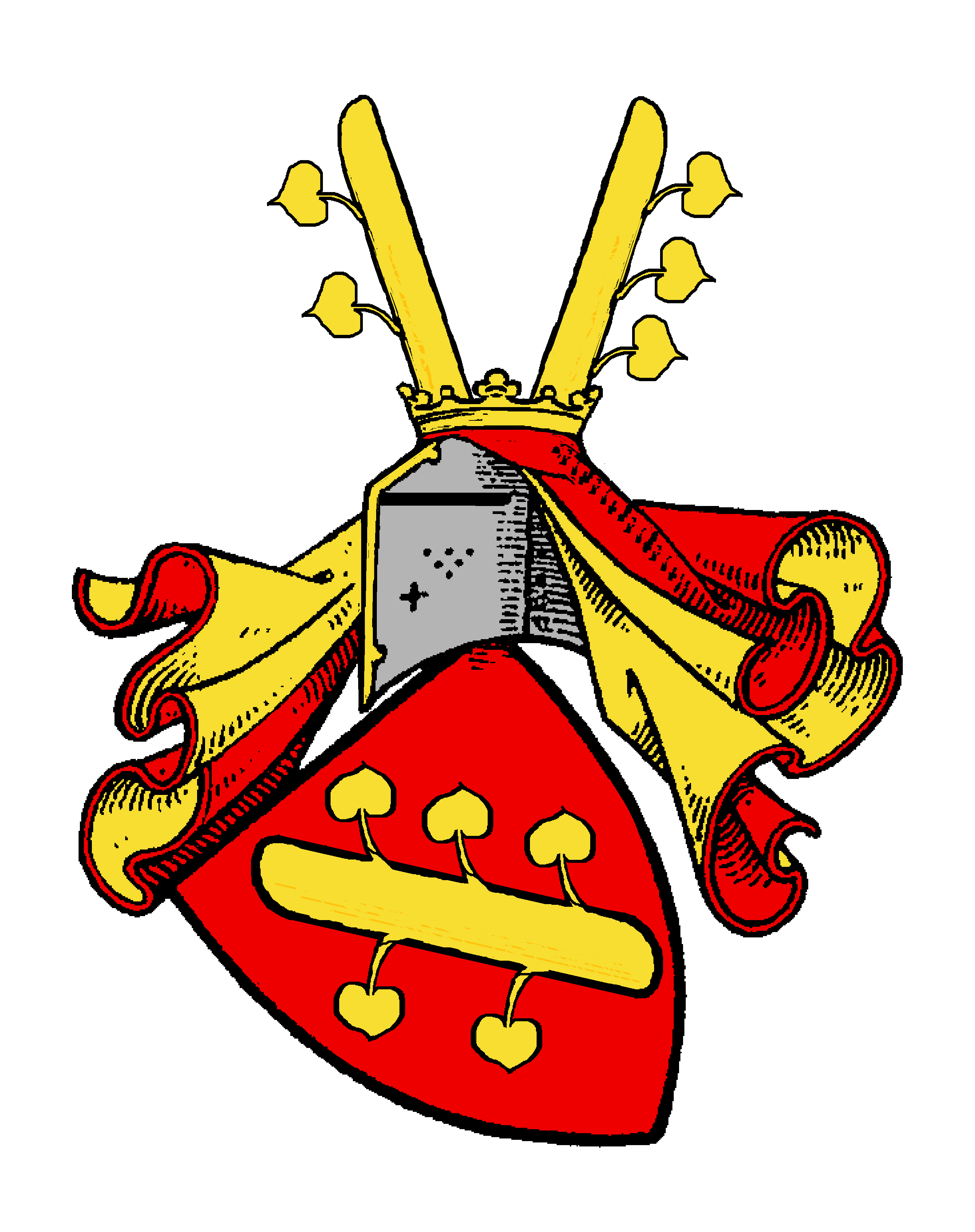 Wappen der Herren von der Linde(n), eines alten preußischen Adelsgeschlechts, das seinen Ursprung in den Niederlanden haben soll und das sich auch nach Schlesien und Schweden ausbreiten konnte. Die Familie besteht gegenwärtig fort.